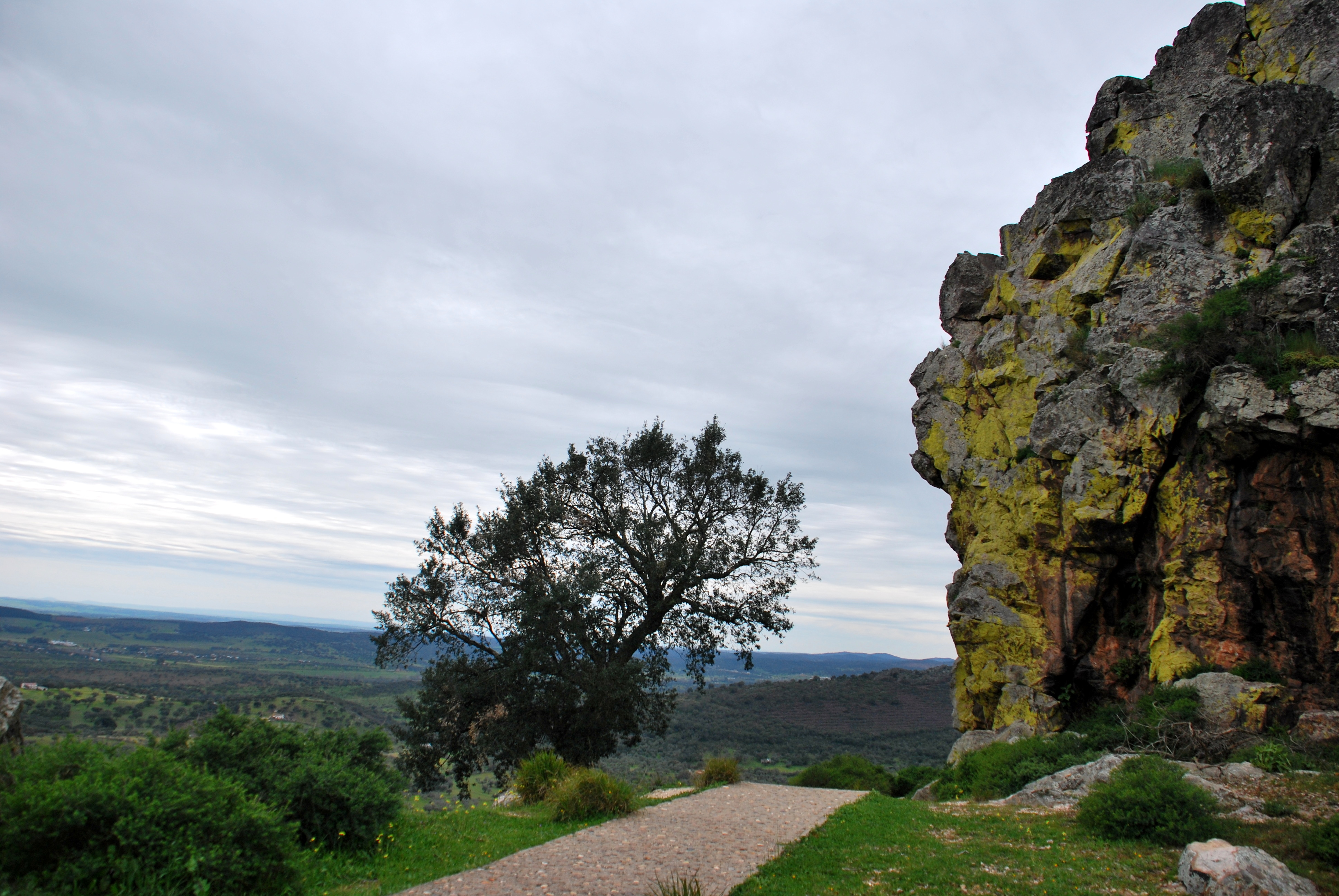 Estremeñu: Vista del abrigo del risco donde se encuentra las pinturas esquemáticas.